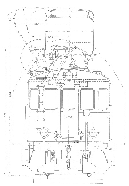 MFO Lok Nr. 2 Vorderansicht